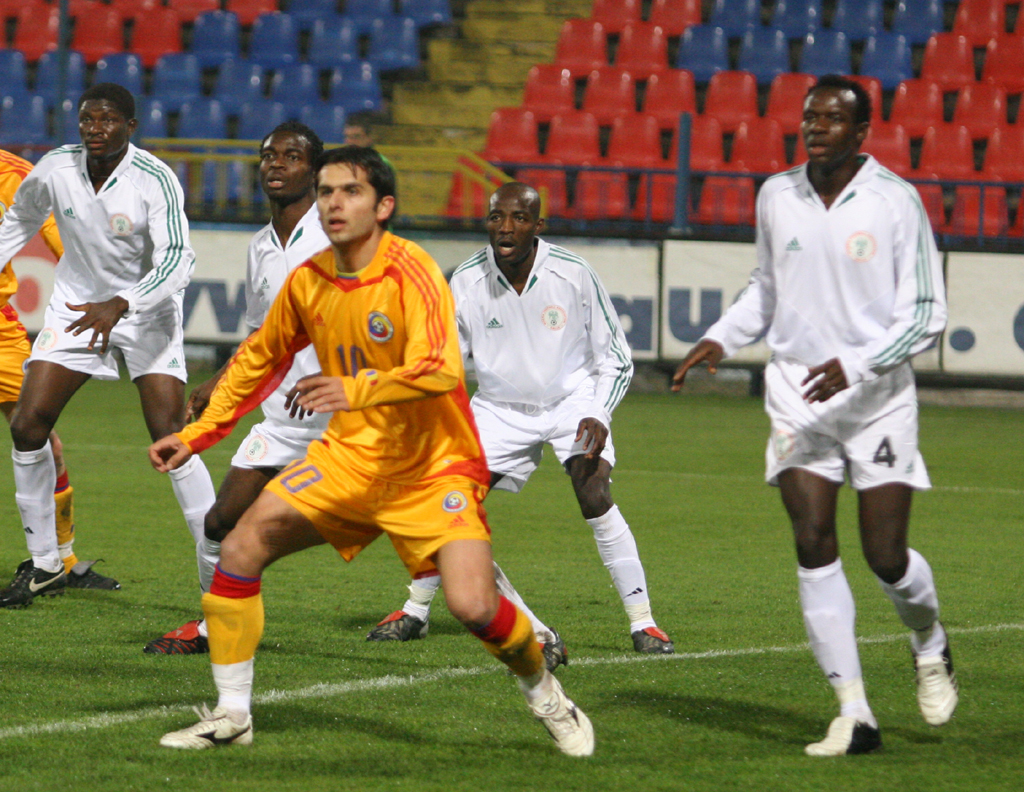 Nicolae Dică jucand împotriva Nigeriei pe Stadionul Steaua.